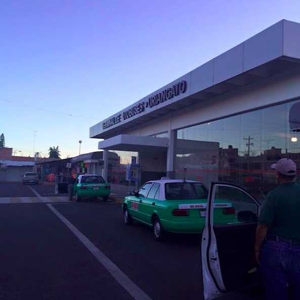 Sitio de Taxis Terminal de Autobuses de Uriangato